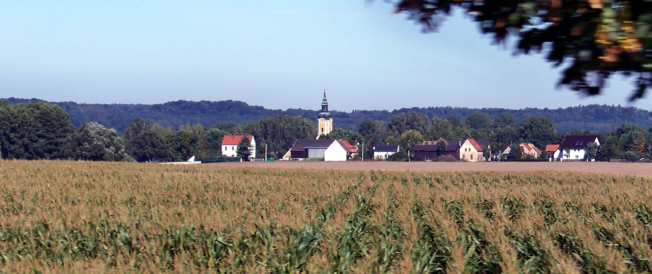 Der Ort Müglenz (Gemeinde Hohburg, Landkreis Leipzig) von Süden von der Staatsstraße 23 aus gesehen.